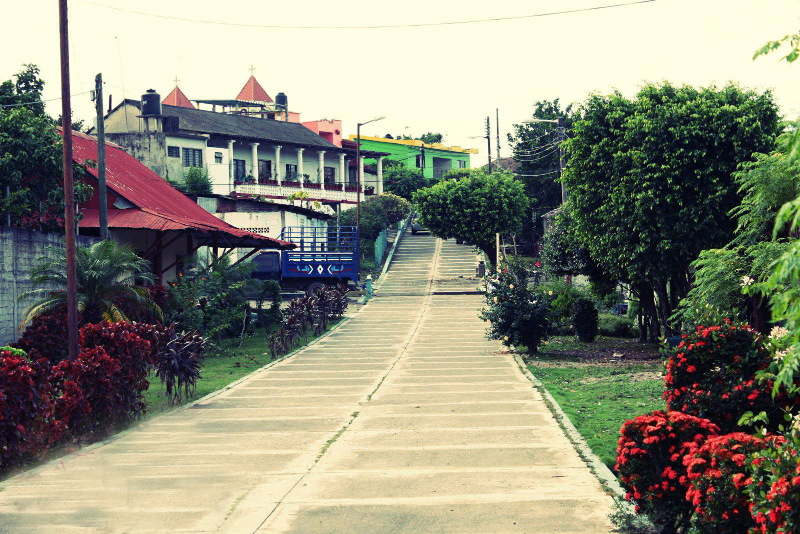 Calzada hacia el Panteón Municipal